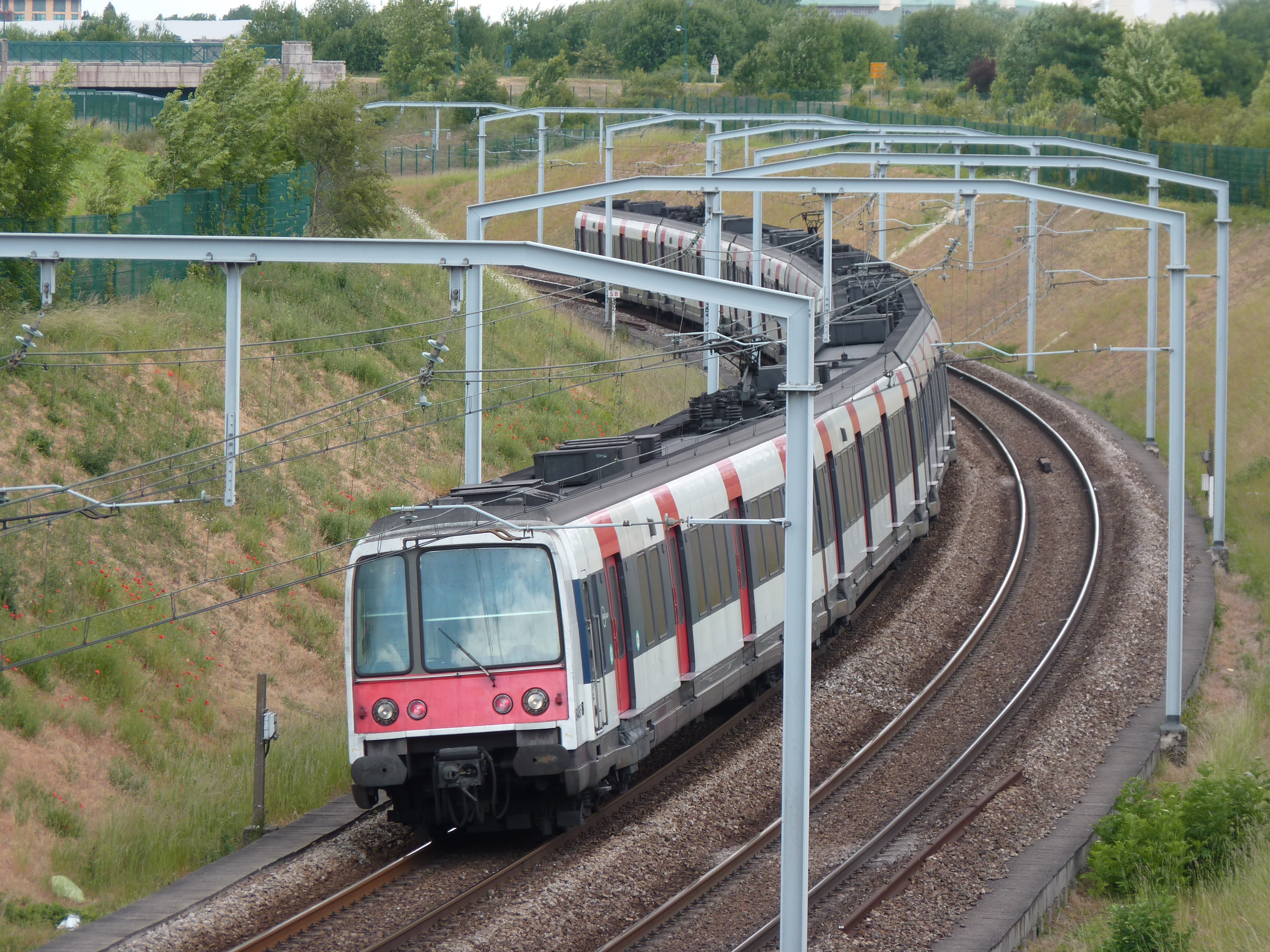 MI 84 8373-74 et 8485-86 sortant de la gare du Val d'Europe.